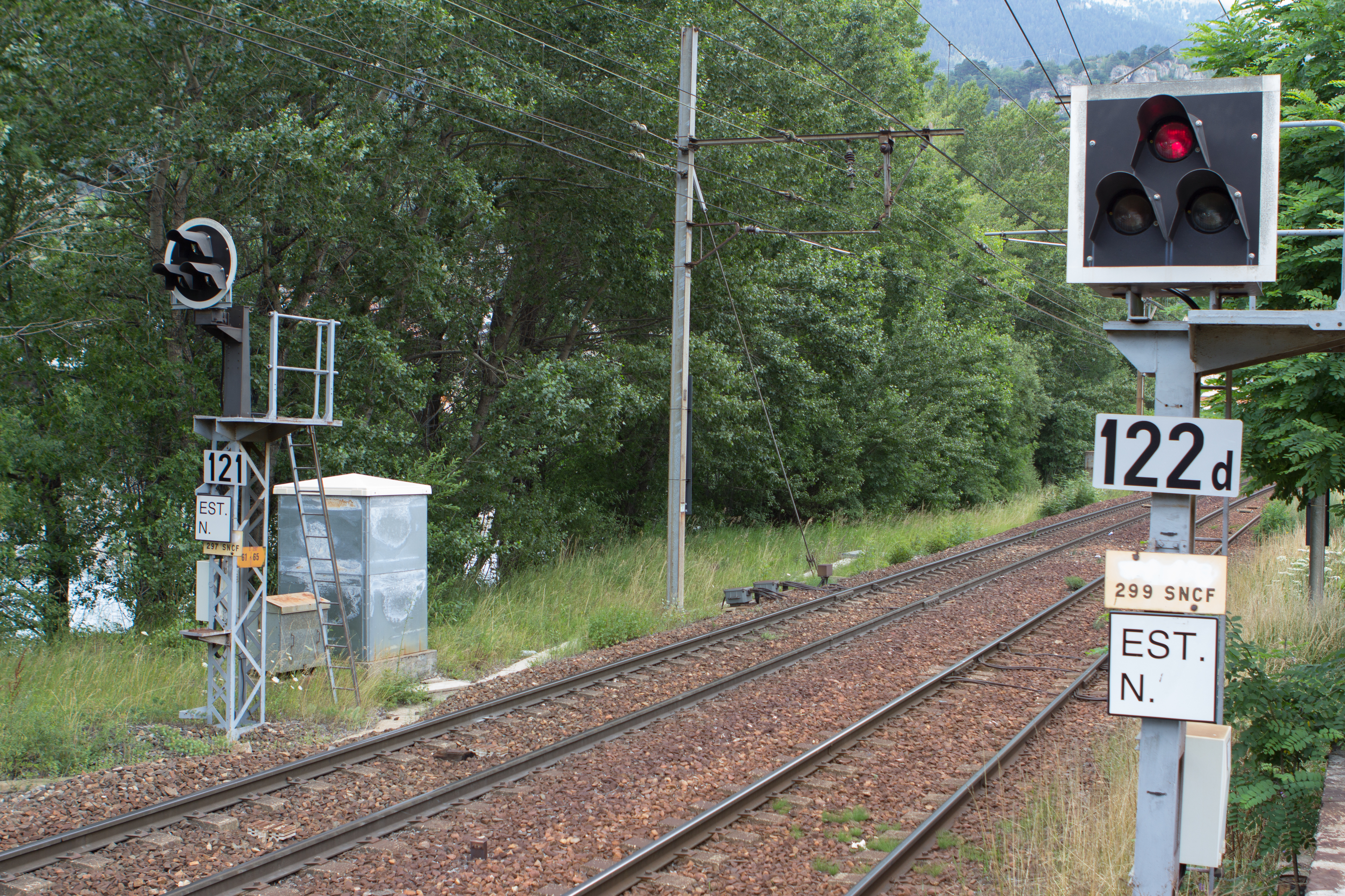 Ligne de la Maurienne, section de Modane au tunnel du Fréjus, alimentation 3000V et signalisation italienne - Modane, Savoie, France